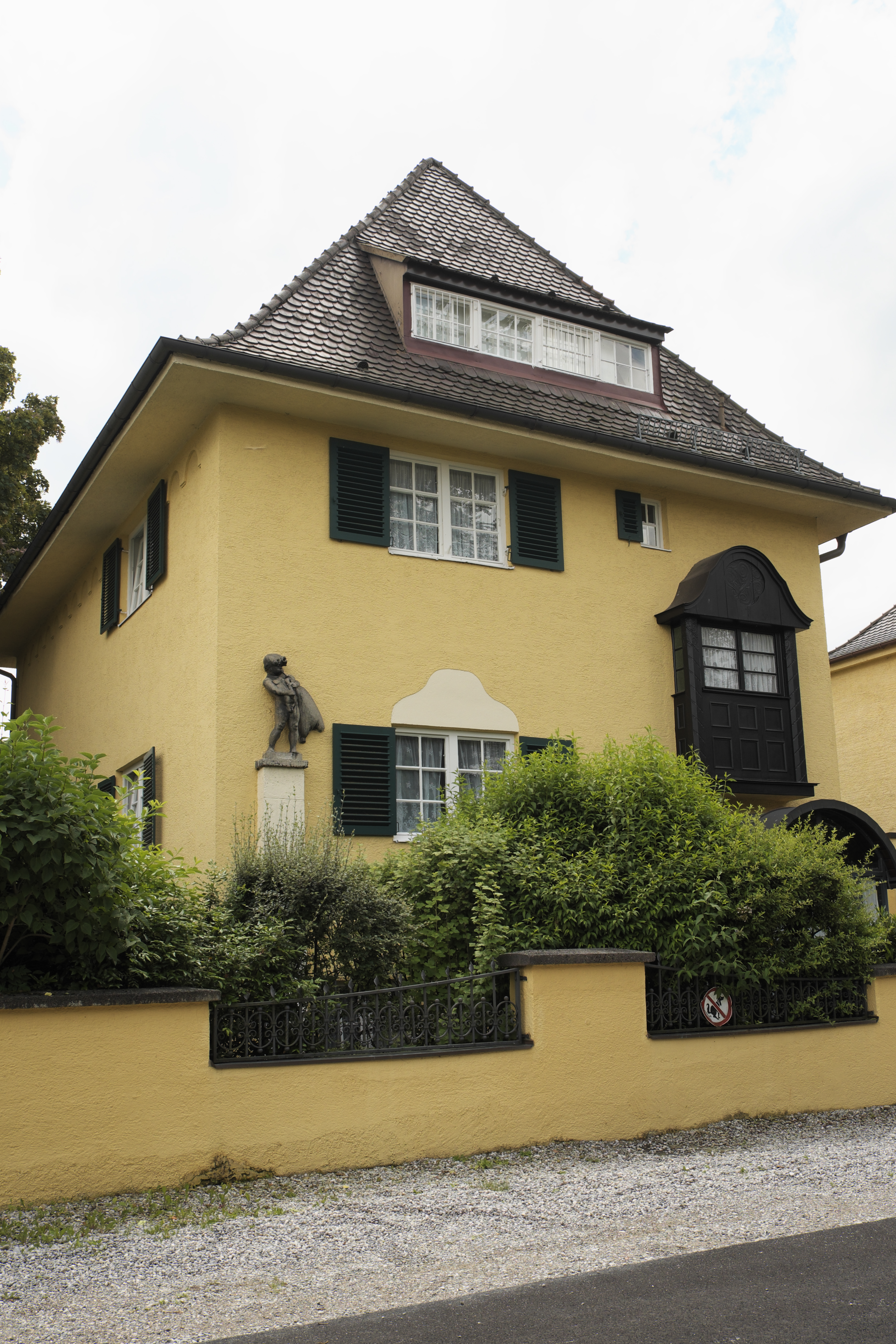 Rembrandtstraße 13 in Pasing im Stadtbezirk Pasing-Obermenzing in München (Bayern/Deutschland)